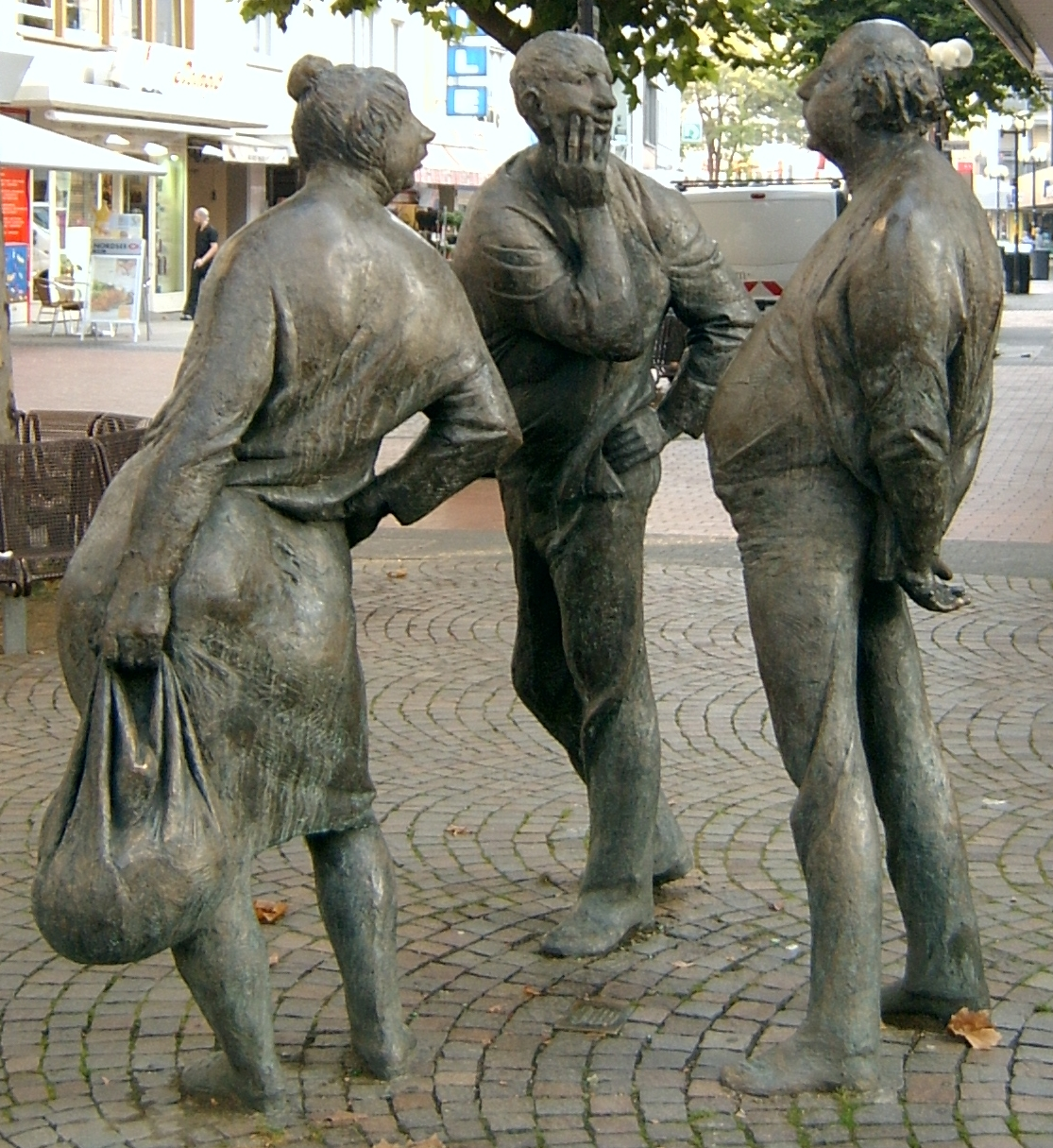 Die drei Schwätzer in Gießen, Seltersweg, Ecke Plockstraße. Eine Bronzeskulptur von Karl-Henning Seemann.